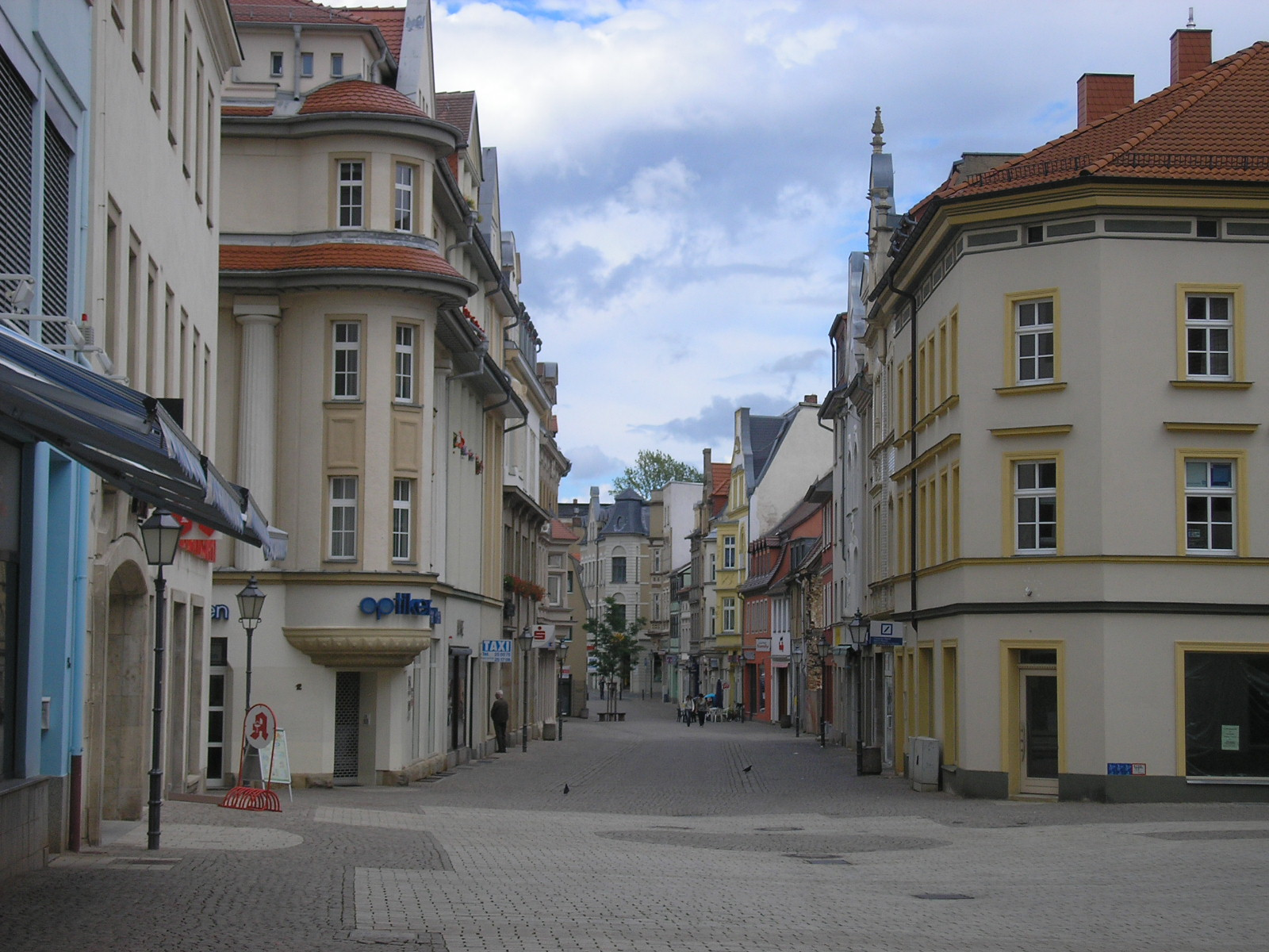 Die Fußgängerzone (Roßmarkt) in Zeitz